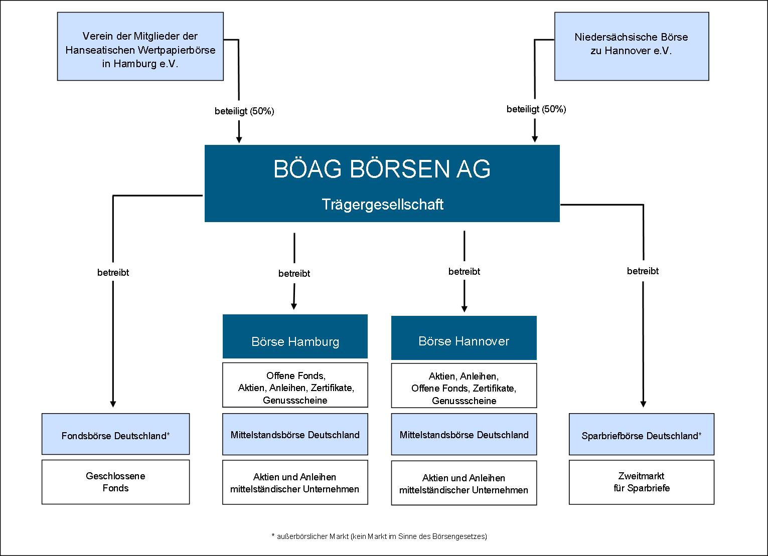 Aktualisiertes Organigramm der BÖAG Börsen AG, 2016